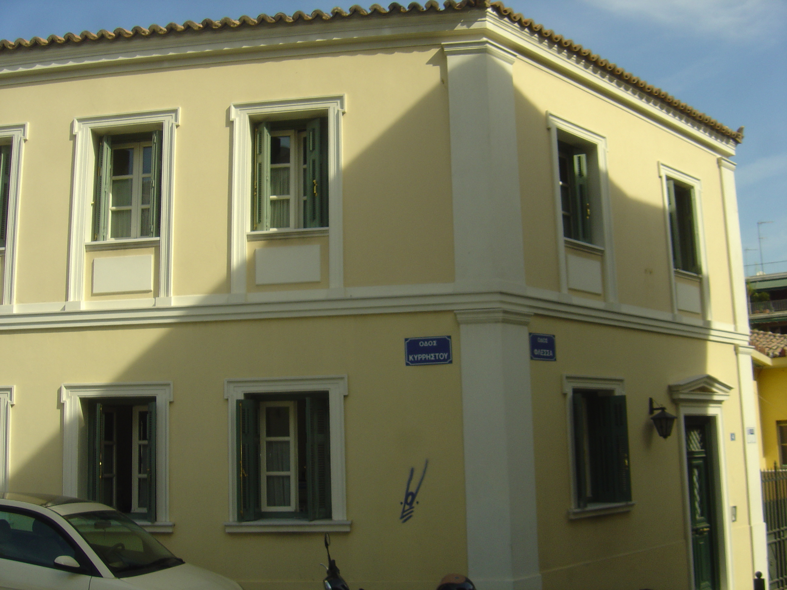 Το Αρχοντικό Γάσπαρη, κτίσμα Τουρκοκρατίας (18ος αι.)